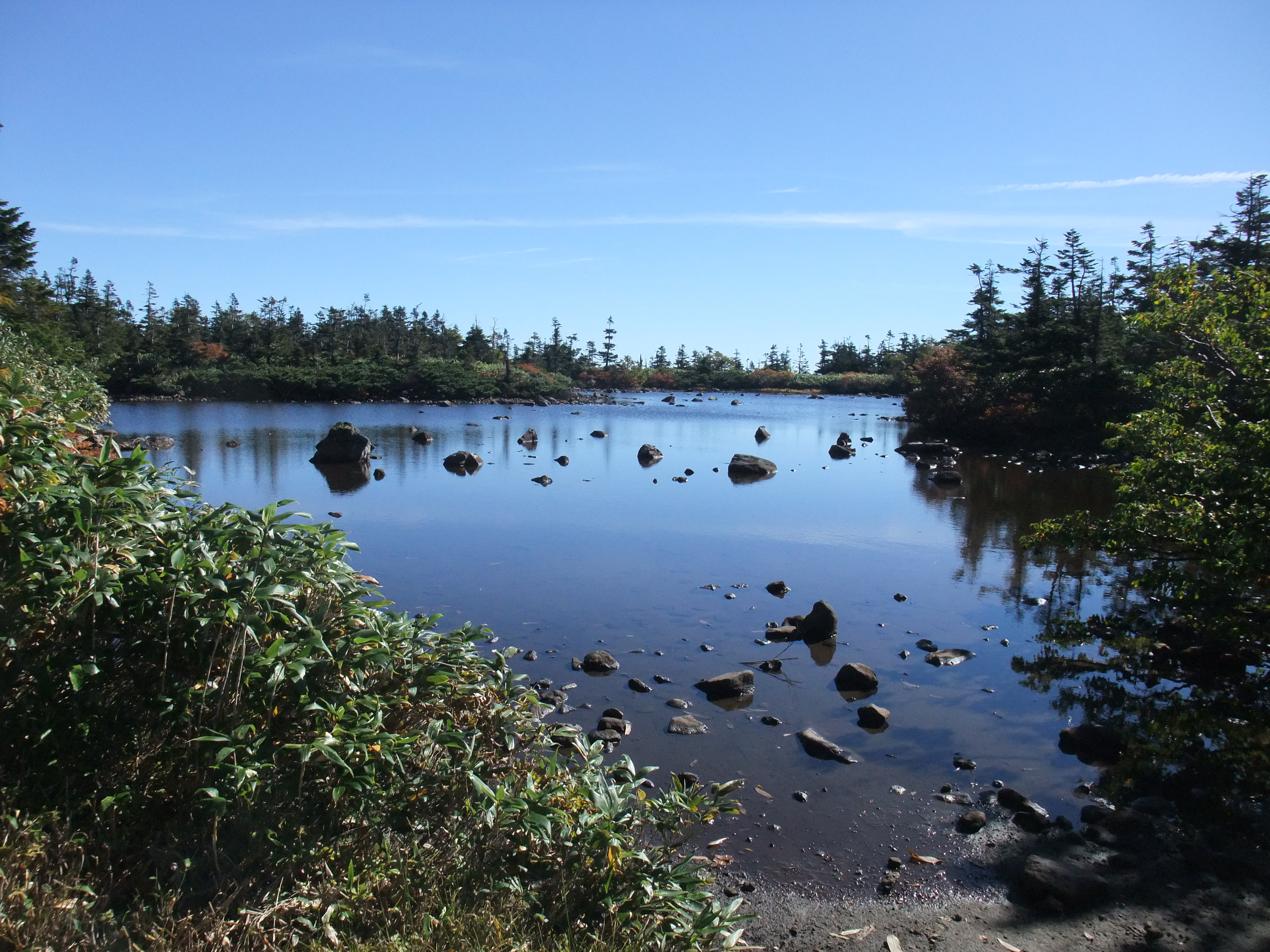 諸桧岳にある石沼